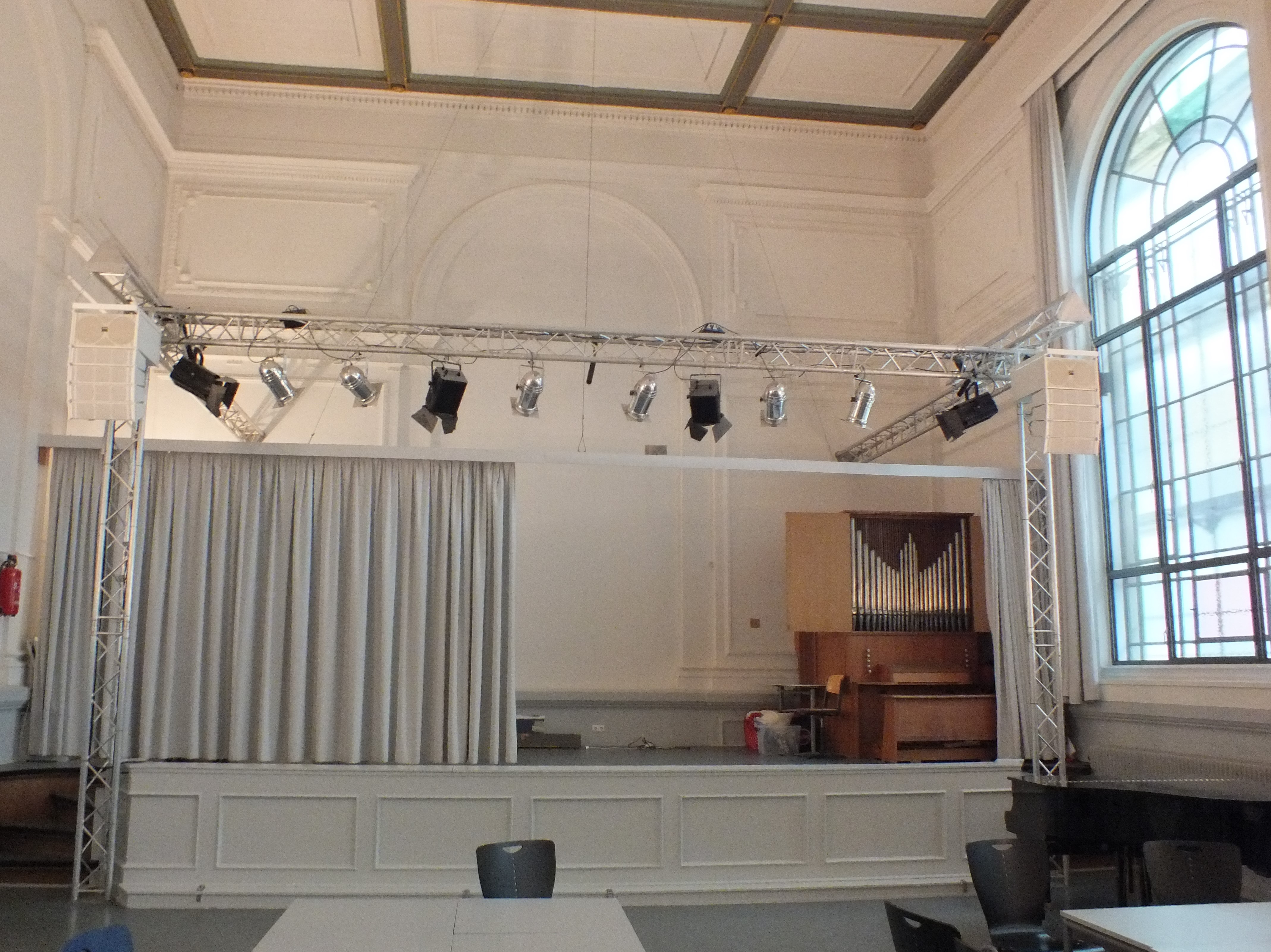 Aula der Abendschule vor dem Holstenwall mit Schulorgel